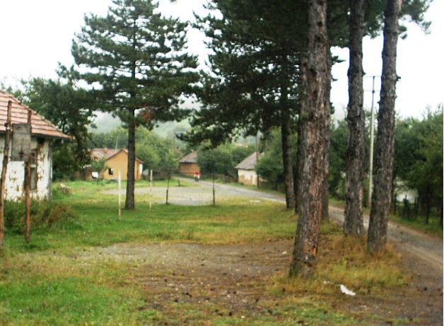 Центар у Кијевцу.